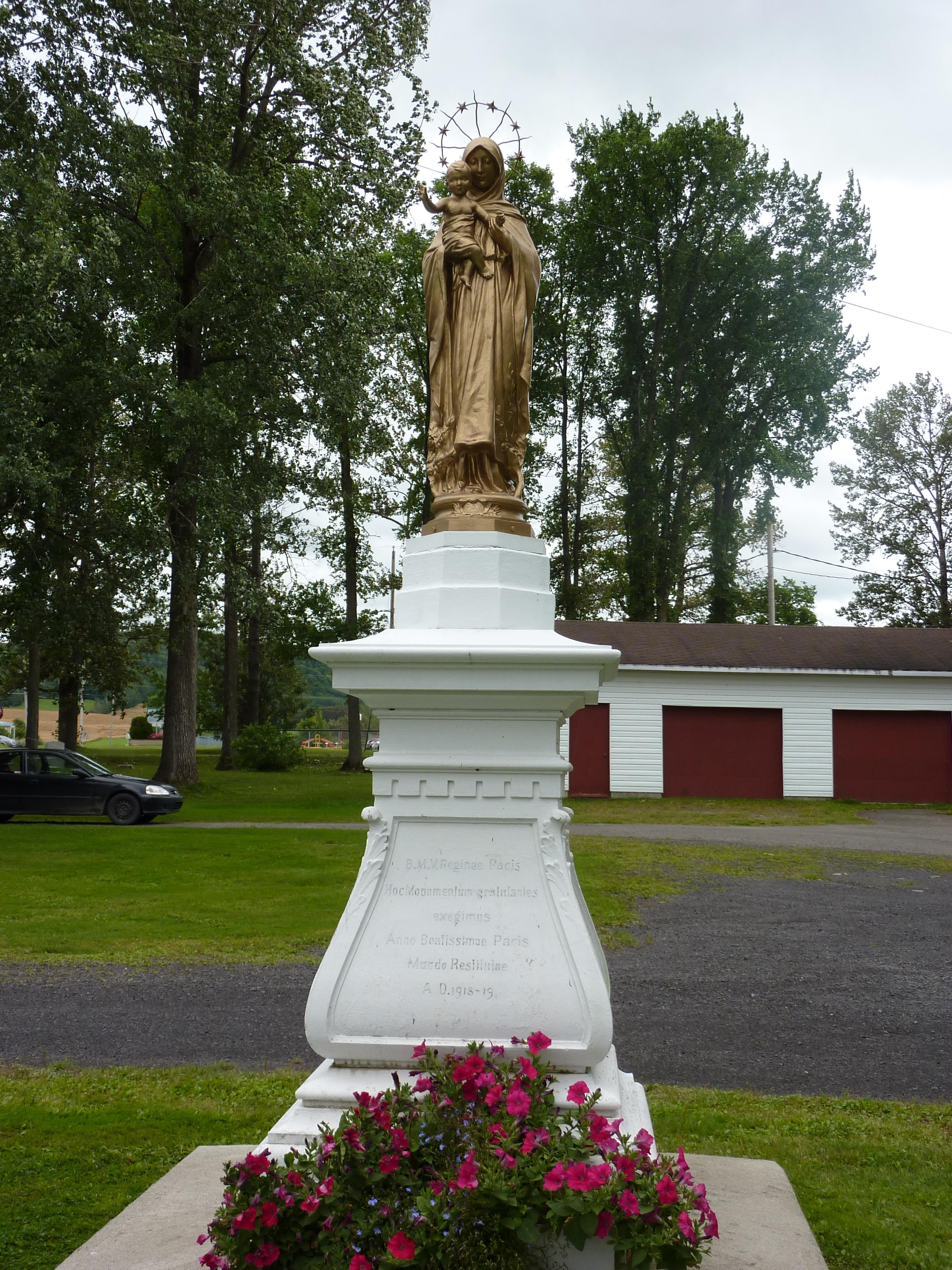 Statue de la Vierge à l'Enfant située entre le presbytère et l'église de Val-Brillant, Québec, Canada